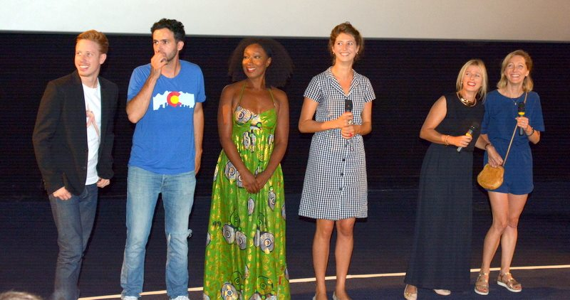 L'équipe du film "Le Petit Locataire" à une avant-première